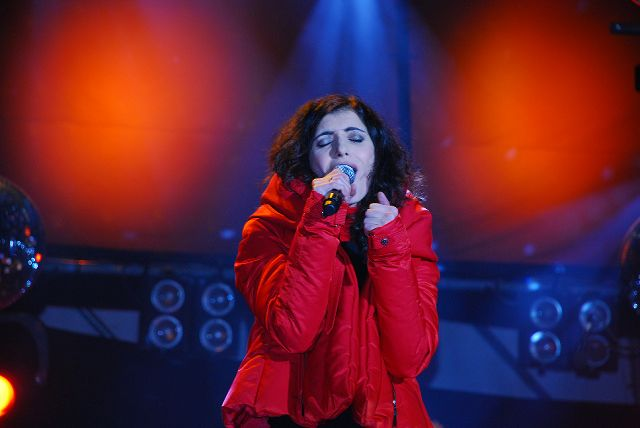 foto scattata durante il concerto di capodanno del 2008 organizzato da MTV Italia.